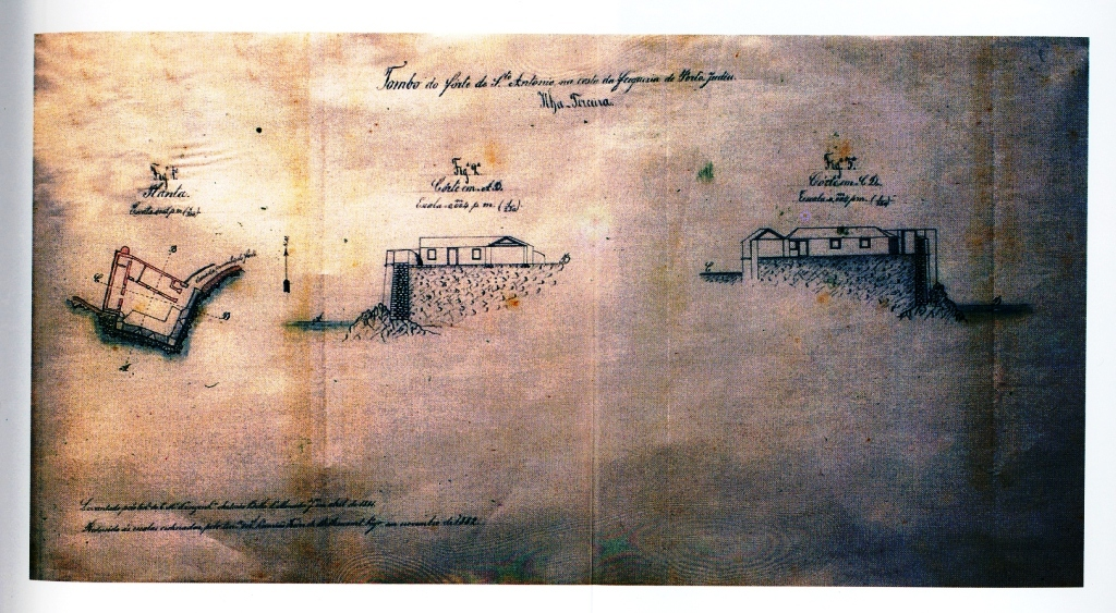 "Tombo do Forte de Sto. António na costa da freguezia de Porto Judeu", Ilha Terceira (Açores), Portugal.